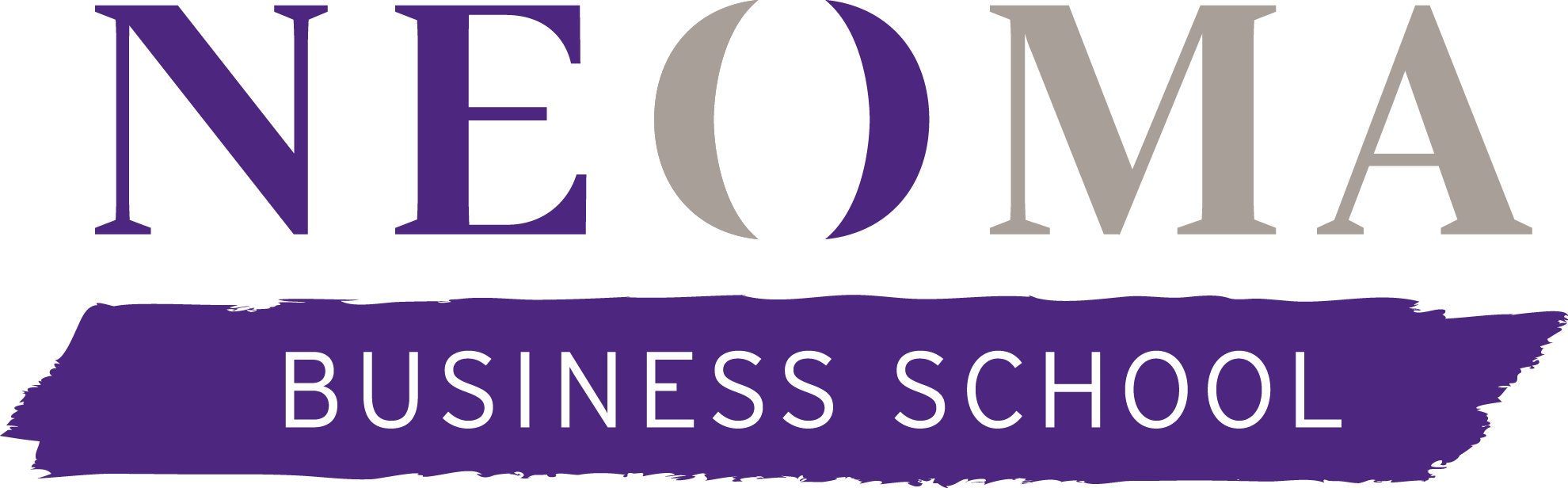 Logo Neoma BS